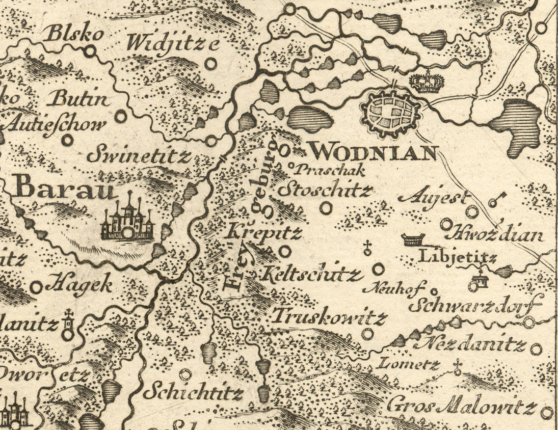 Obec Libějovice na výřezu z mapového listu XVII Müllerovy mapy Čech, jižně od Vodňan.